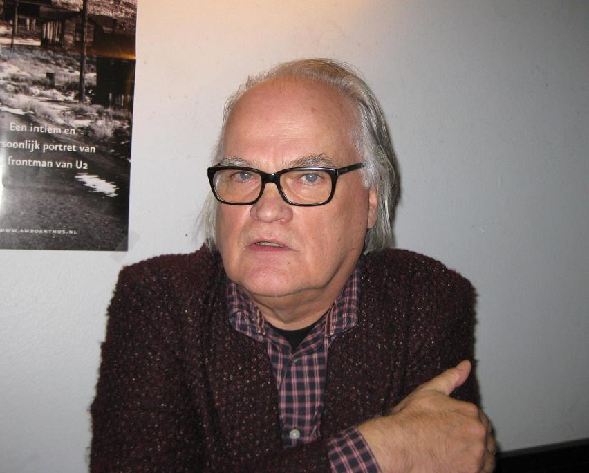 Bert van de Kamp, Nederlands popjournalist bij de presentatie van zijn boek over Bono